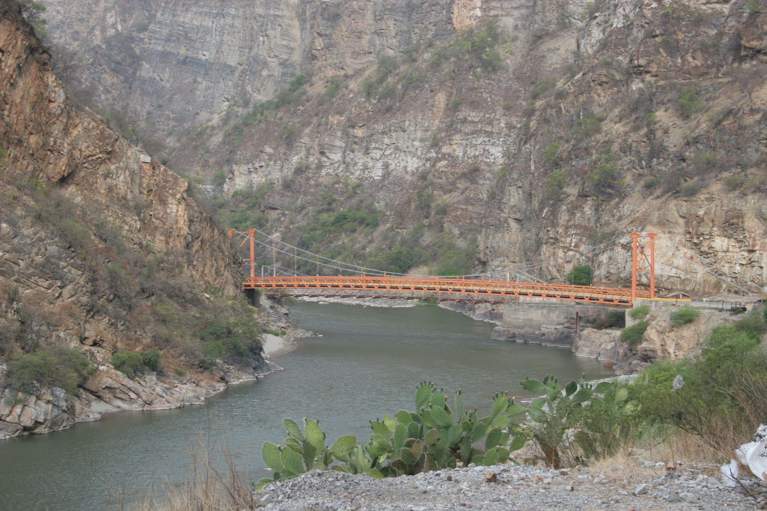 Orange Bridge